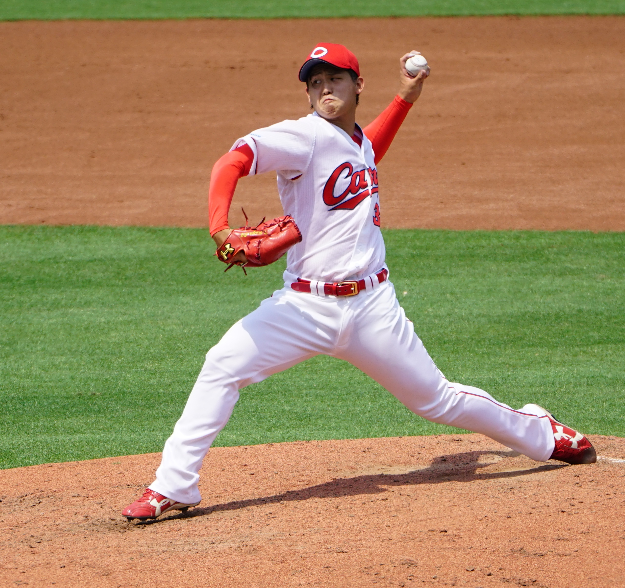 2017年6月10日、MAZDA Zoom-Zoom スタジアム広島の2軍戦（対オリックス）にて